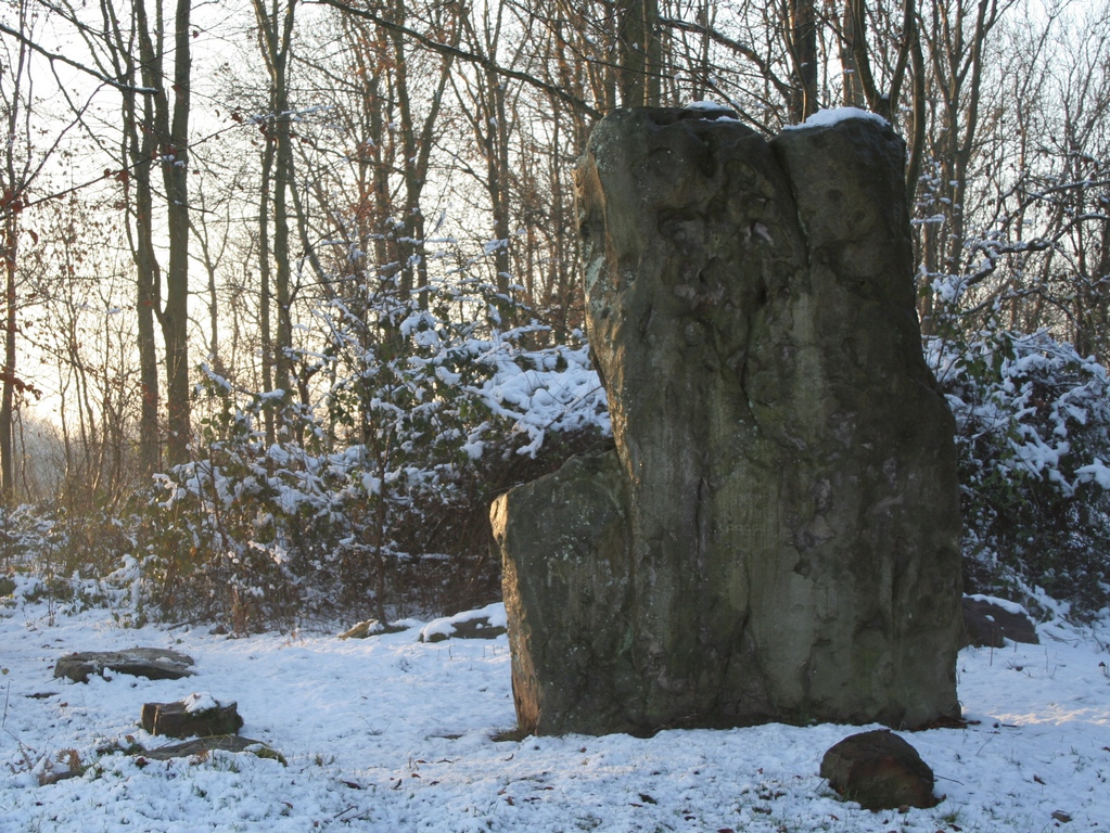 Le mégalithe et le polissoir sur le site néolithique au lieu-dit Les Tiennes de Jemeppe (M) ainsi que le site néolithique au lieu-dit Les Tiennes de Jemeppe (S)